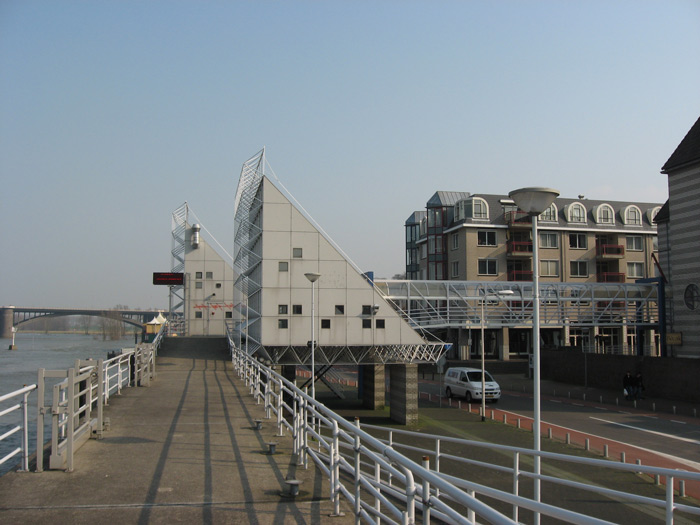 Hoogwatersteiger aan de Waalkade te Nijmegen, ontwerp van architect Antoon Croonen. Foto door mij gemaakt.